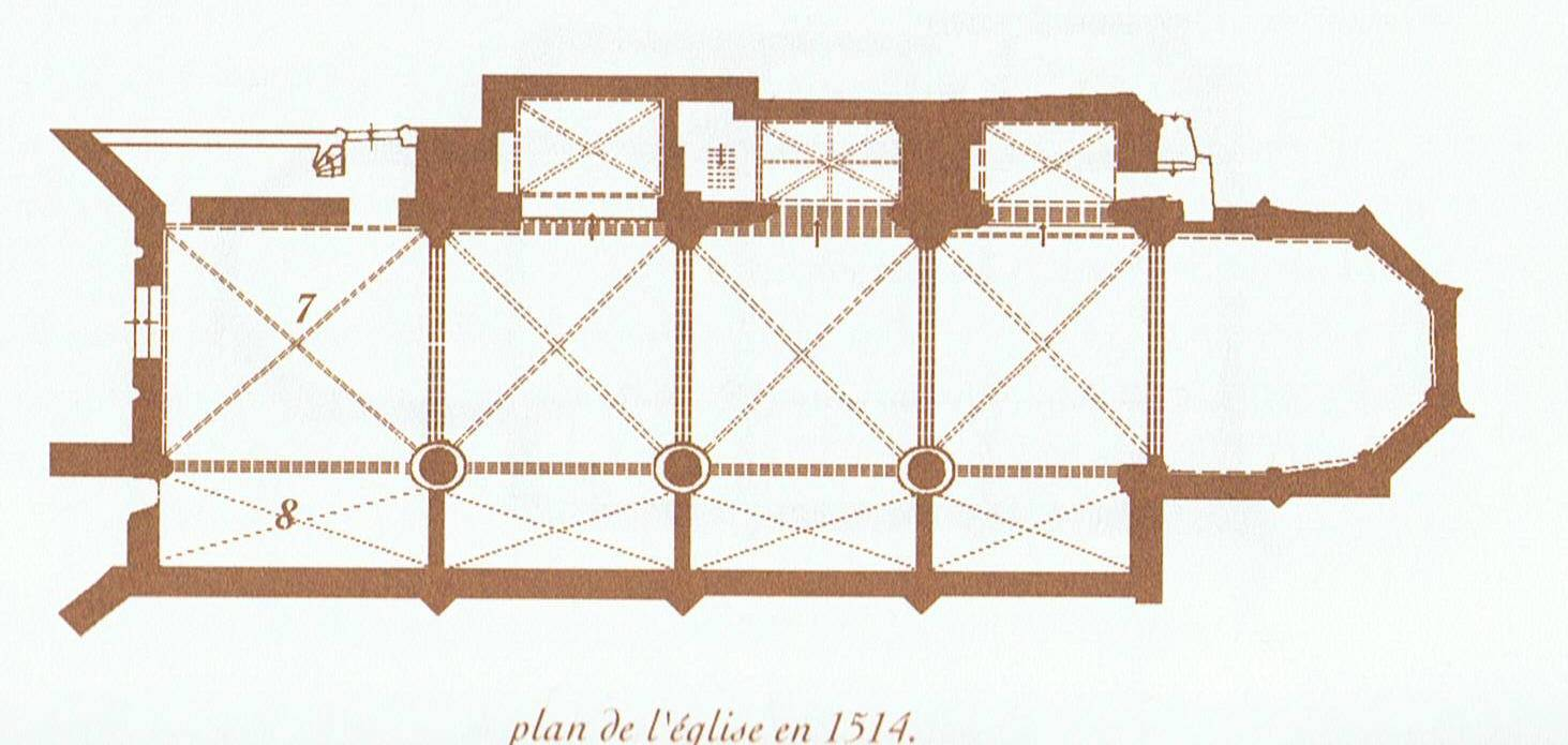 Plan eglise saint Nicolas en 1514